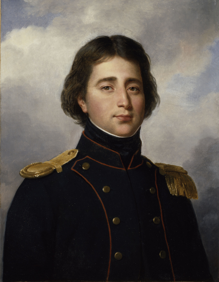 Commandé par Louis-Philippe pour le musée historique de Versailles en 1835